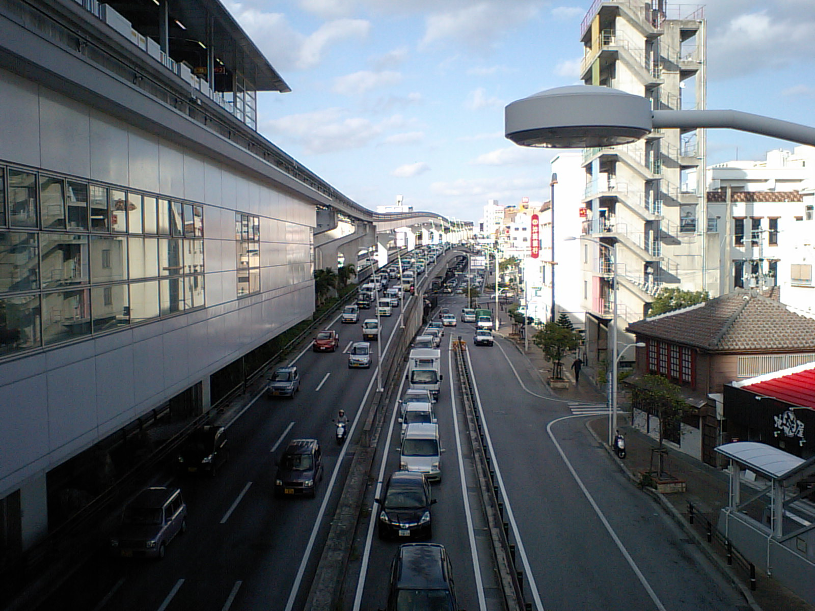 沖縄県那覇市安里交差点、安里駅2Fから北方へ向けて。直進すると古島。右に曲がると東の大道、首里方面。左に曲がると西の国際通り、泊方面です。